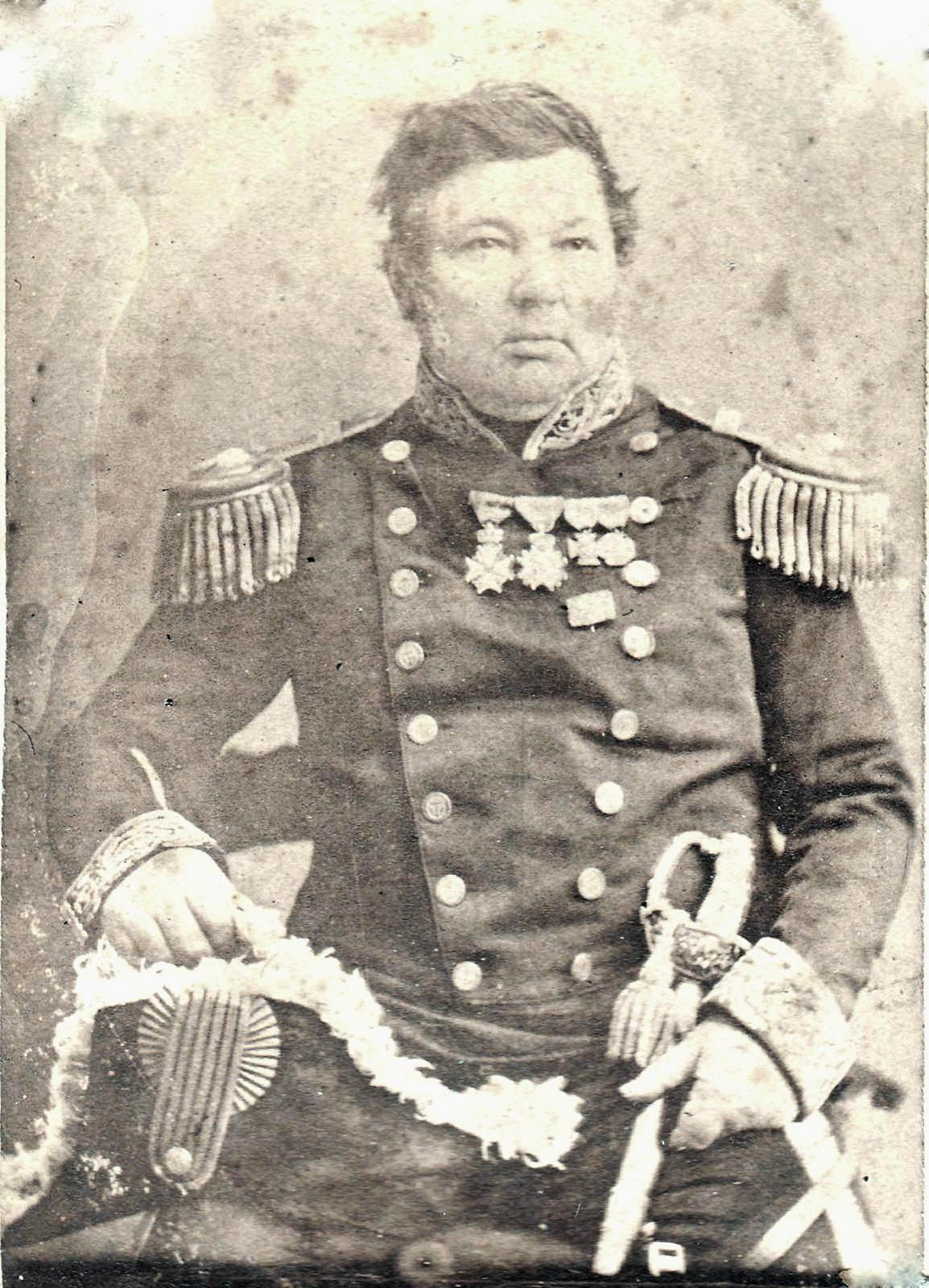 Vice-admiraal Coops